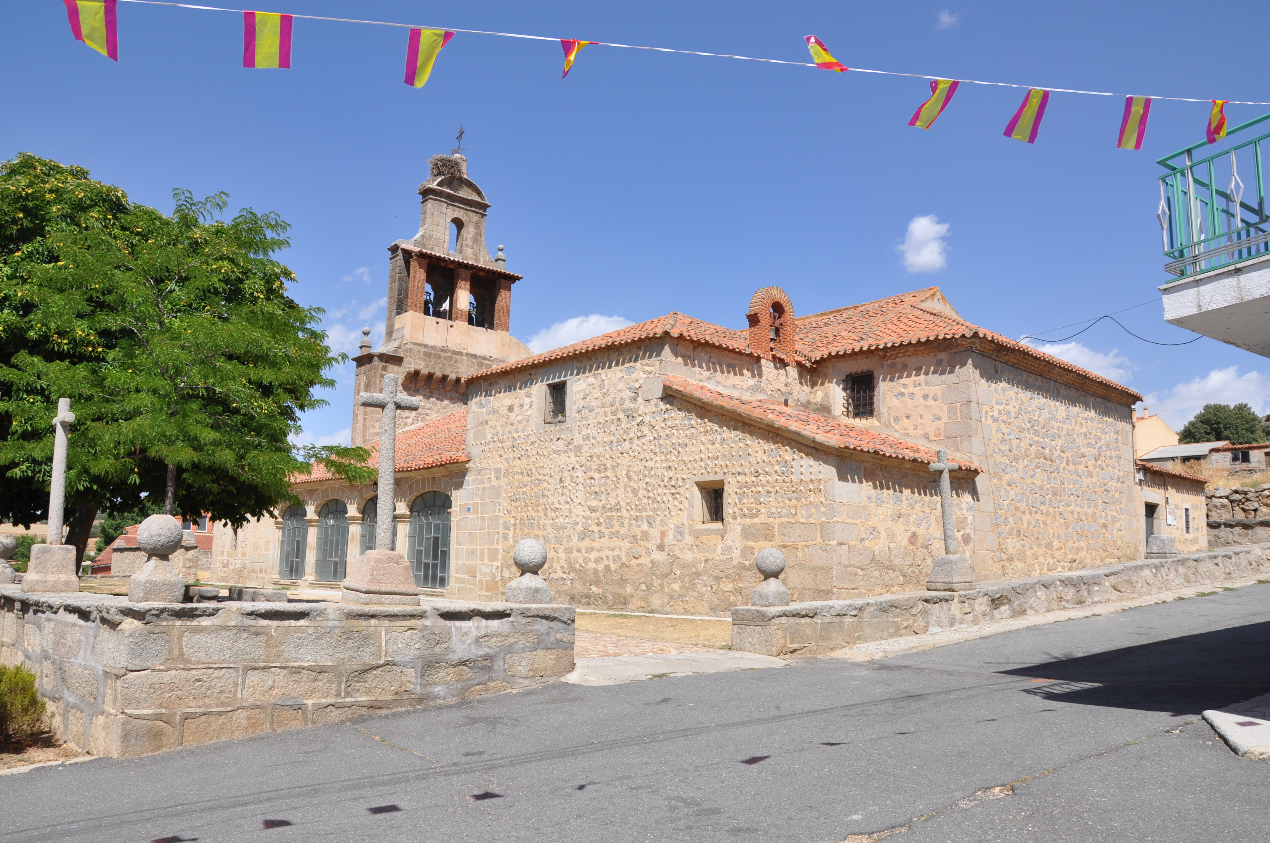 Iglesia parroquial de San Lucas evangelista, Muñogalindo, AV, España